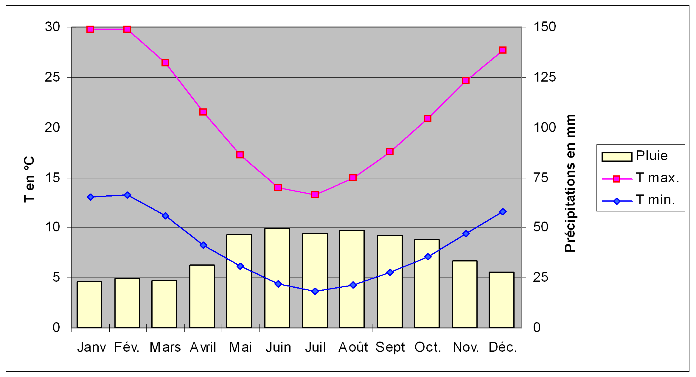 Diagramme climatique de la ville d'Horsham (Australie), comprenant deux courbes, représentant les températures maximales et minimales, et un histogramme, représentant la pluviométrie, pour les douze mois de l'année.